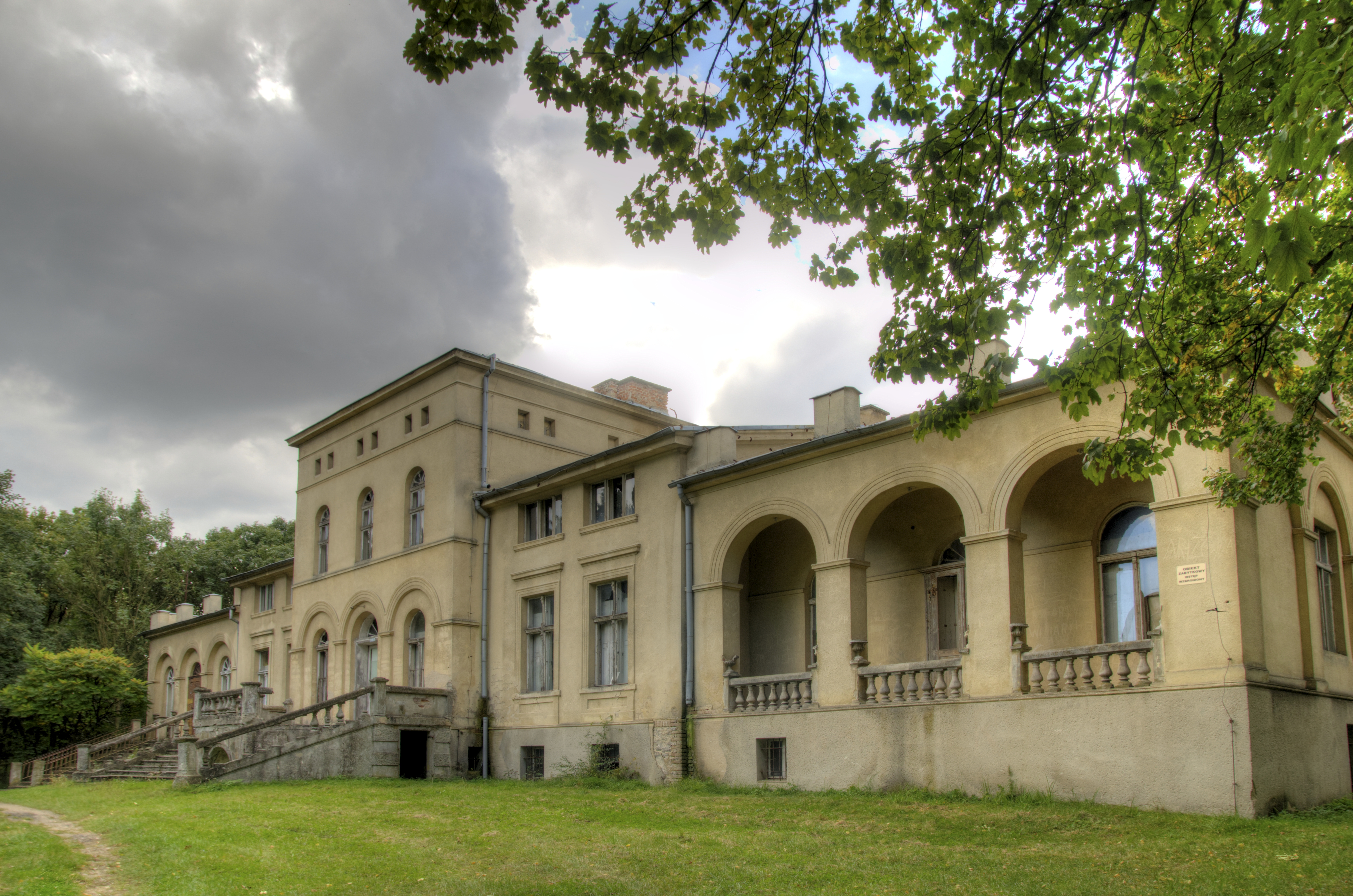 pałac z 1840 r., XIX/XX w. Pakosław, Lwówek